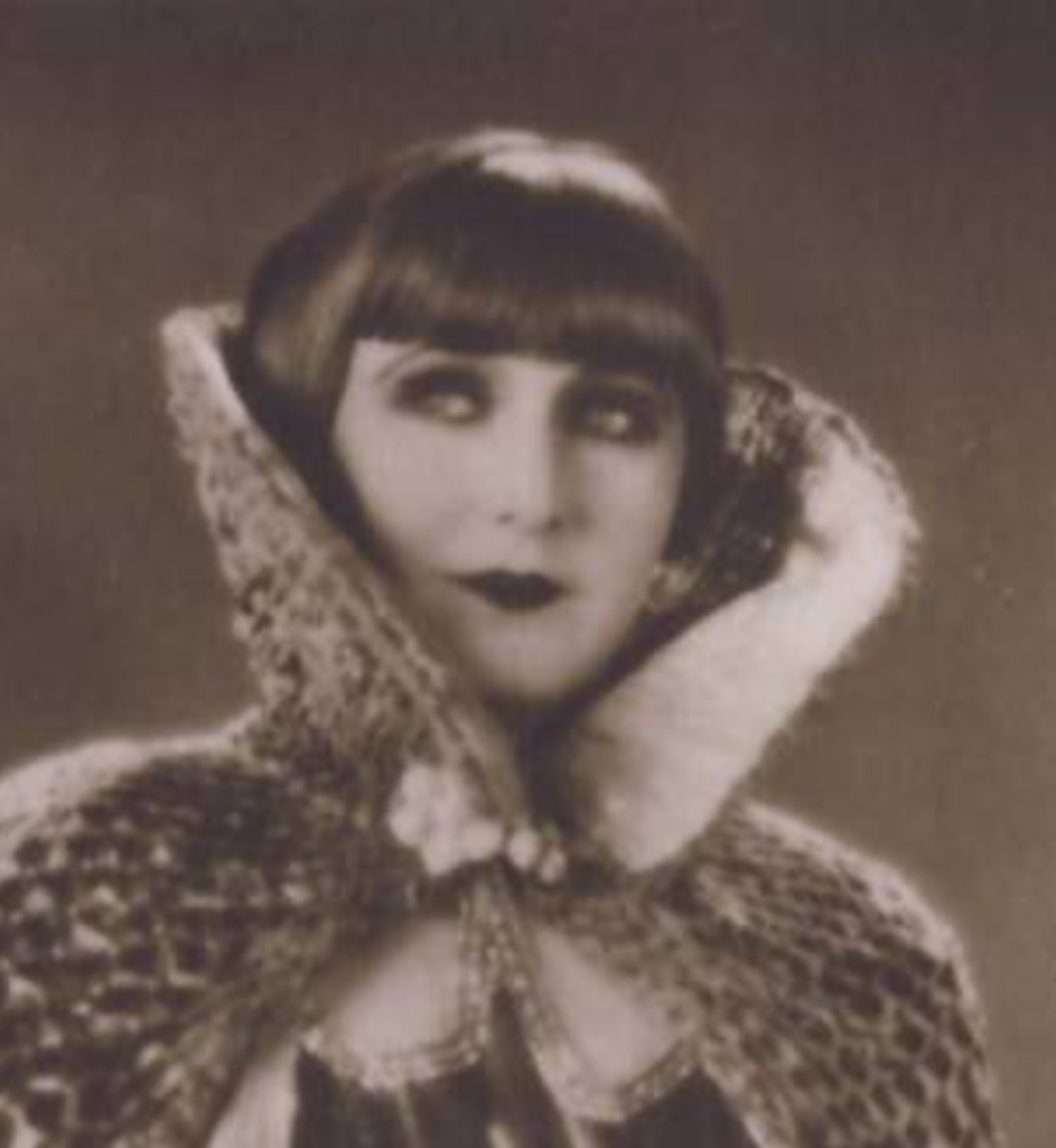 María Corda, eigentlich Mária Antónia Farkas, auch Maria Korda (* 4. Mai 1898 in Déva, Ungarn; † 15. Februar 1976 in Thônex, Schweiz), ungarischer Stummfilmstar